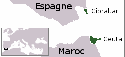 Mapa de Ceuta (España) Locator map - Gibraltar This locator map was created by Vardion and is released into GFDL.